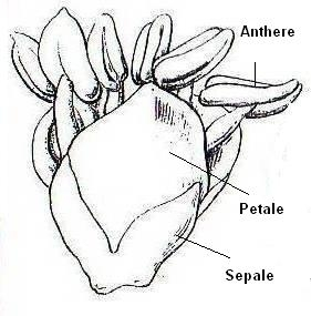 Zeichnung von O.Beccari. Beschriftung durch Arnold krüger